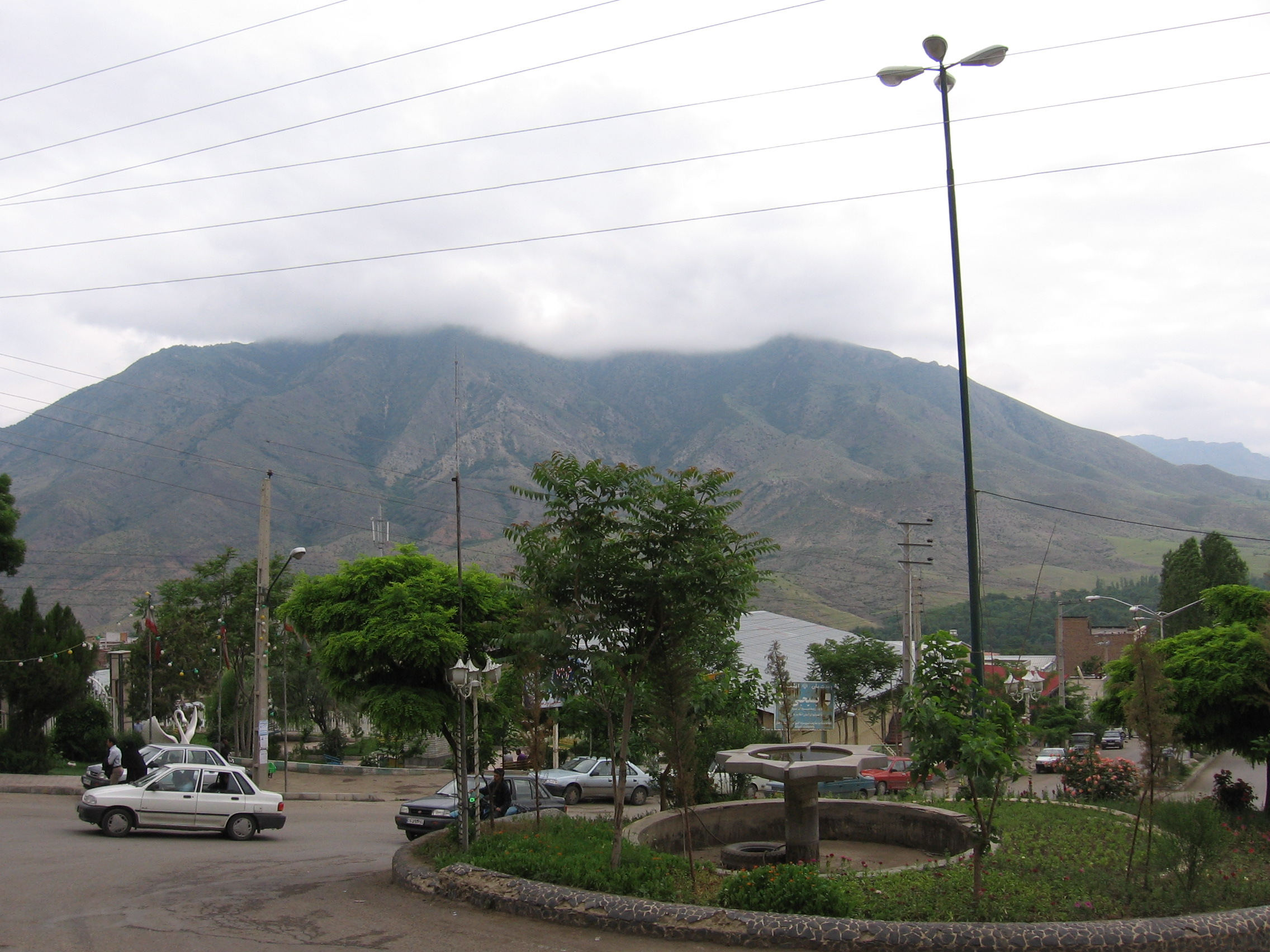 Kaleybar